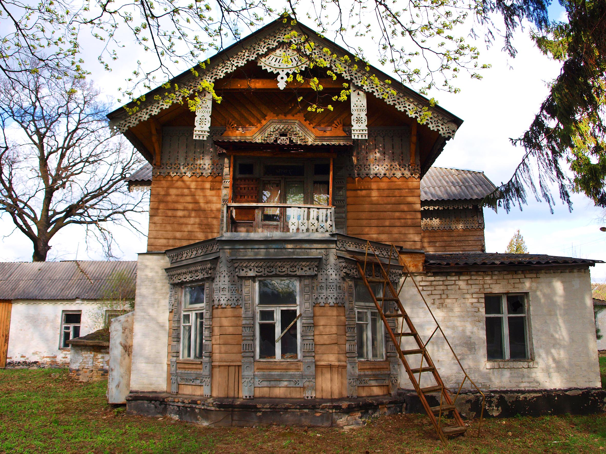 Дача Добромирових, поч. ХХ ст. Боярка. вул. Хрещатик, 20